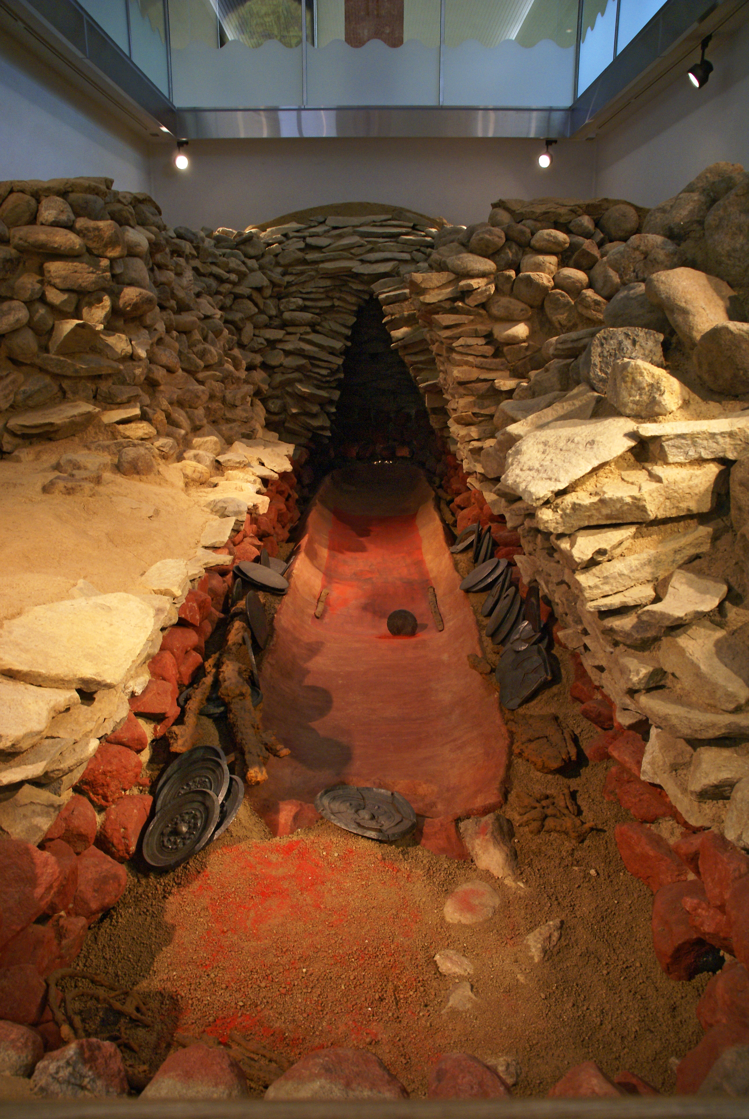 Tenri Municipal Kuroduka-kofun Museum in Tenri, Nara, Japan